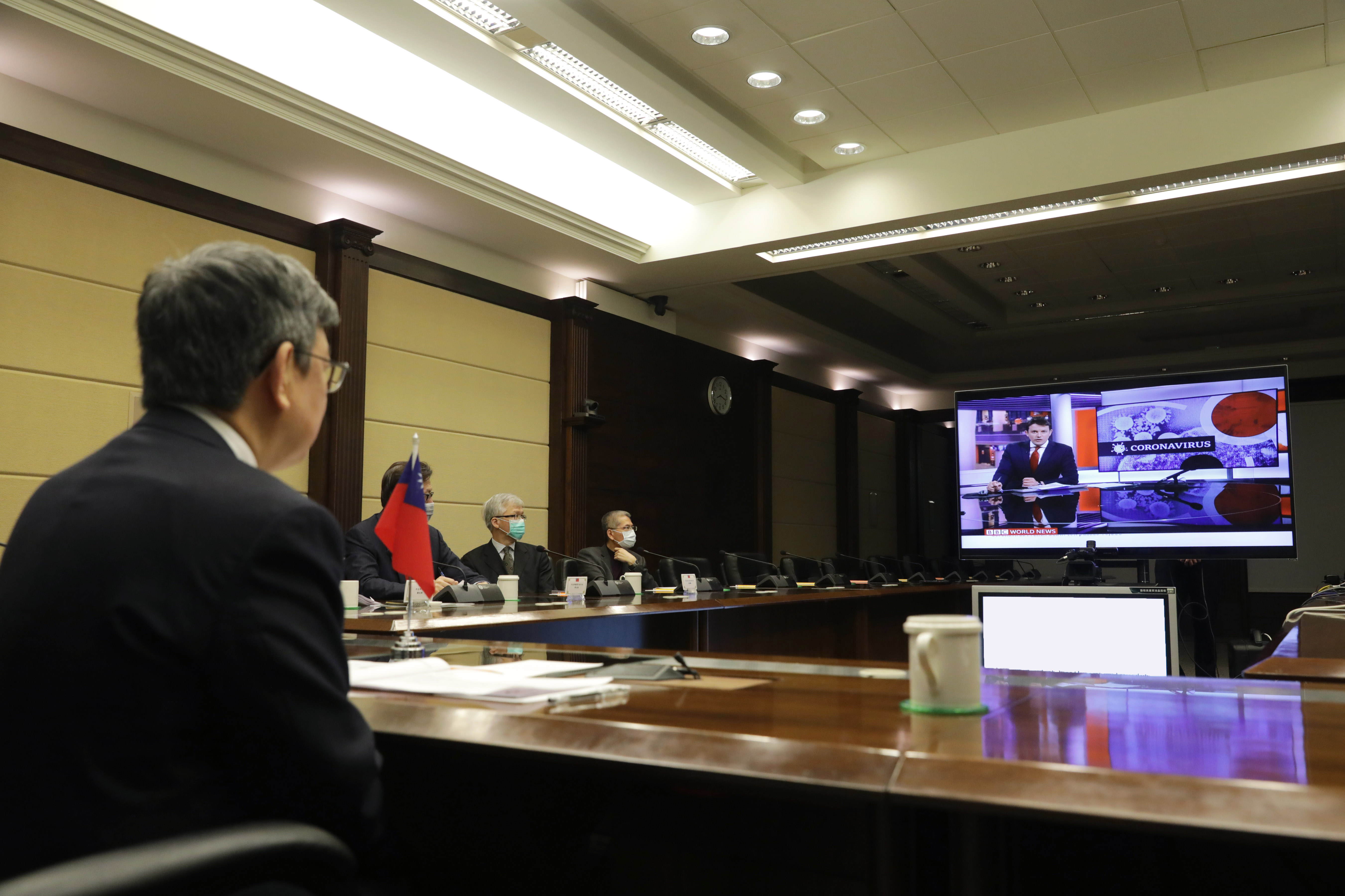 中華民國副總統陳建仁接受英國廣播公司世界新聞頻道專訪